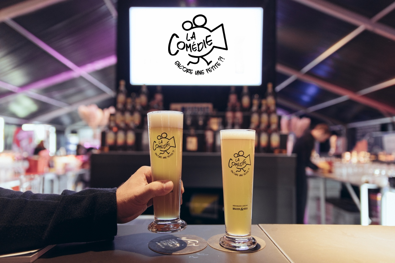 photo de la bière